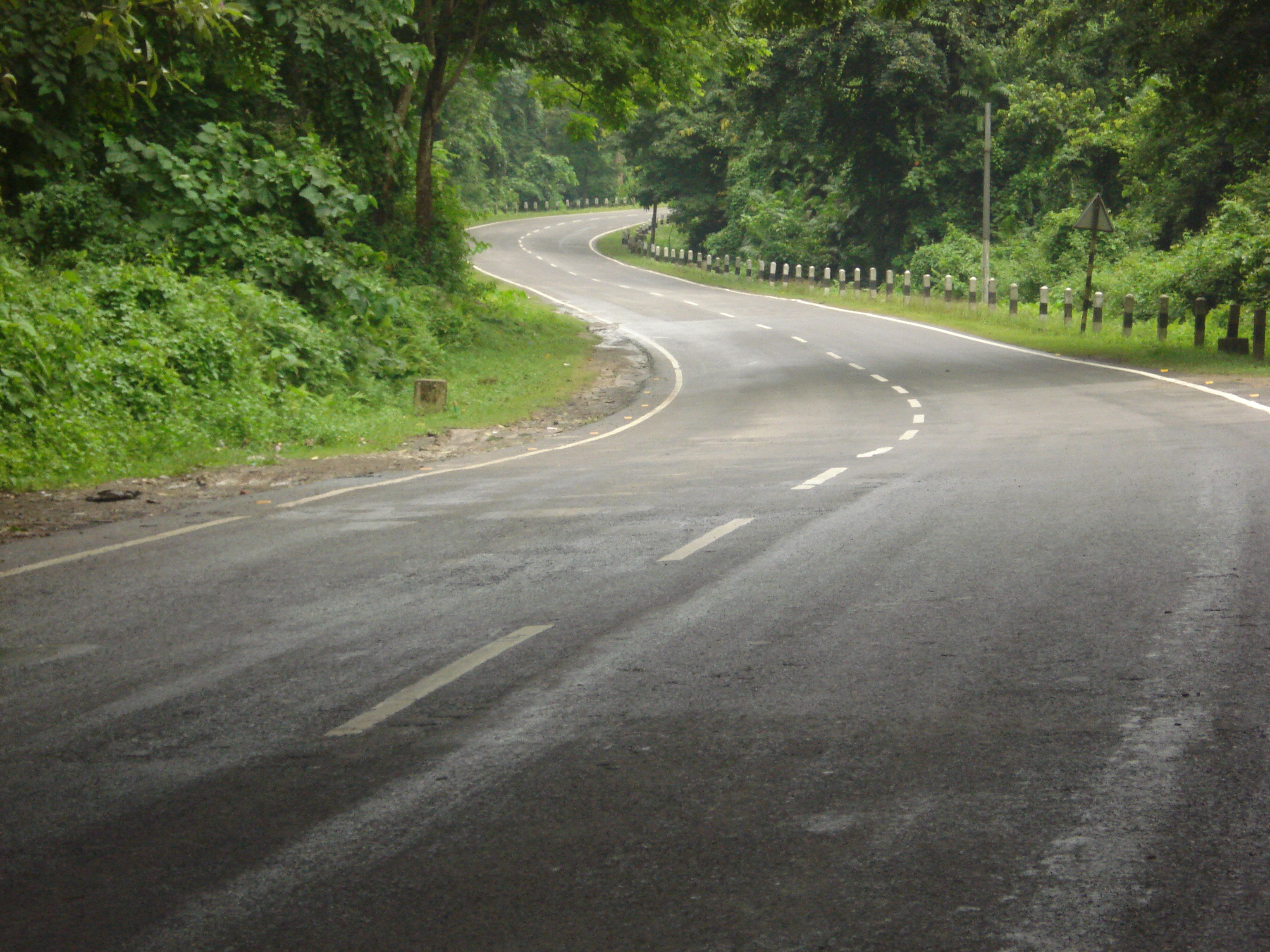 काजीरंगा के निकट राष्ट्रीय राजमार्ग 37